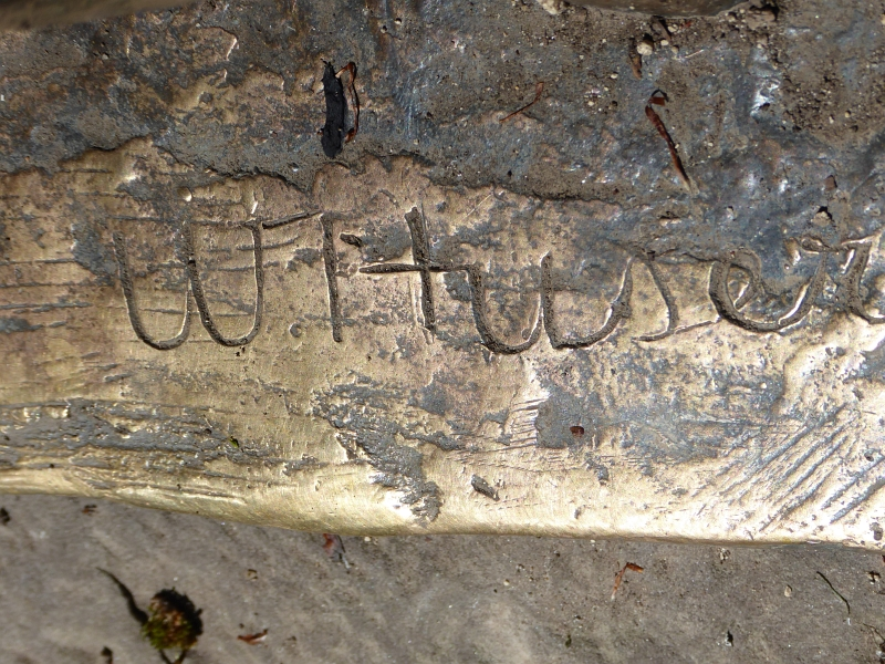 Skulptur in Arlesheim, unterhalb Burg Reichenstein. Technik, Lost Wax Technik oder Cire Perdue Guss, Fonderie Brotal Mendrisio